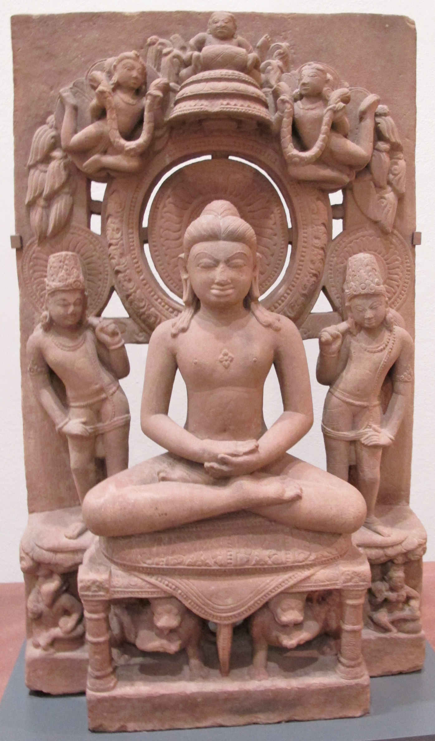 India, uttar pradesh, jina rishabhanatha, 800-900